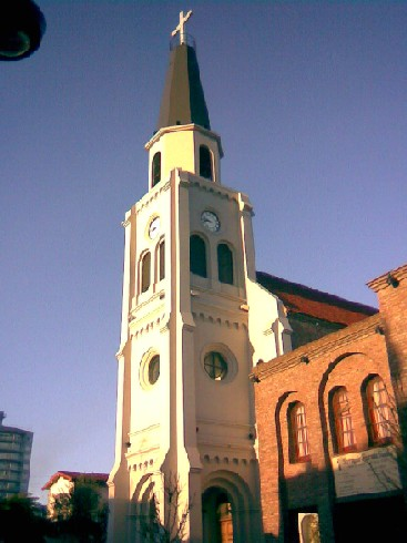 Sagrada Familia church, Berazategui